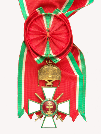 Magyar Érdemrend Szent Koronával ékesített nagykeresztje hadiszalagon a kardokkal